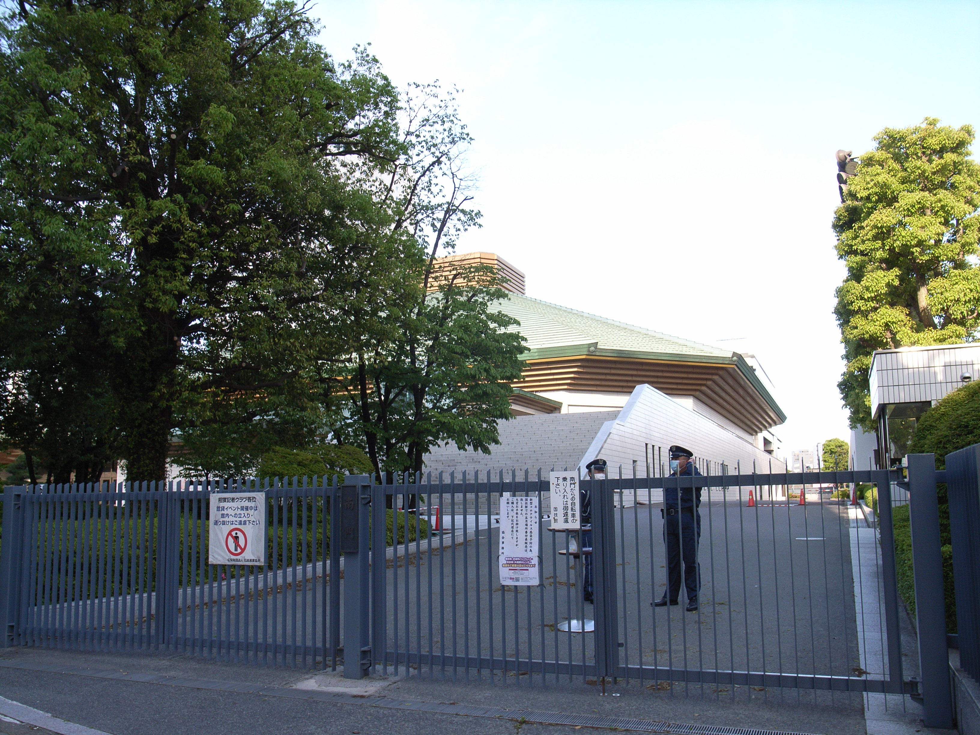 新型コロナウイルスで閉鎖中の両国国技館